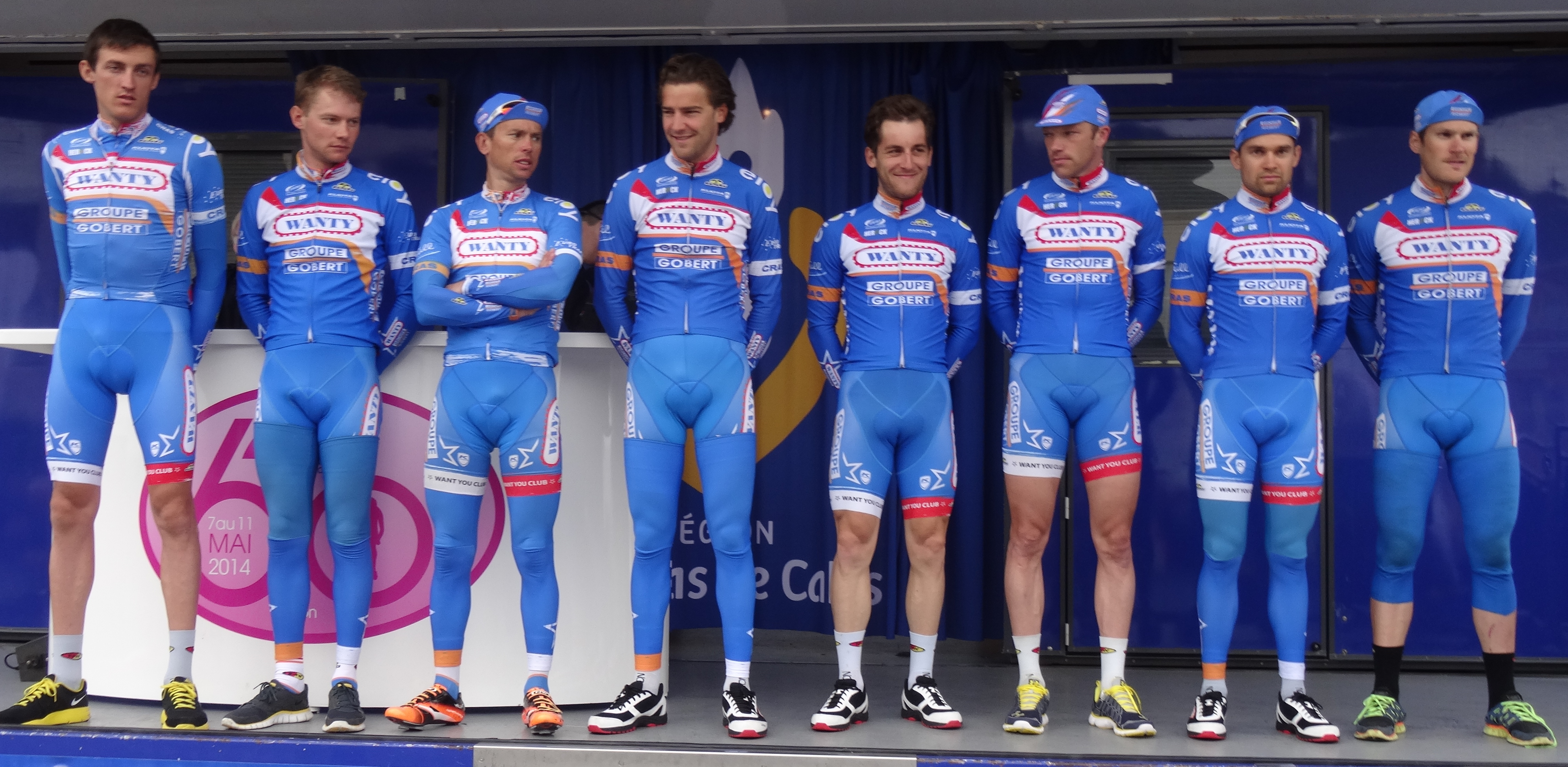 Reportage photographique réalisé le jeudi 8 mai 2014 au départ de la deuxième étape de l'édition 2014 des Quatre jours de Dunkerque à Hazebrouck, Nord, Nord-Pas-de-Calais, France. Depicted people: Francis De Greef, Jan Ghyselinck, Nico Sijmens, Laurens De Vreese, Tim De Troyer, Frederik Veuchelen, Marco Minnaard and Jempy Drucker Depicted team: Wanty-Groupe Gobert